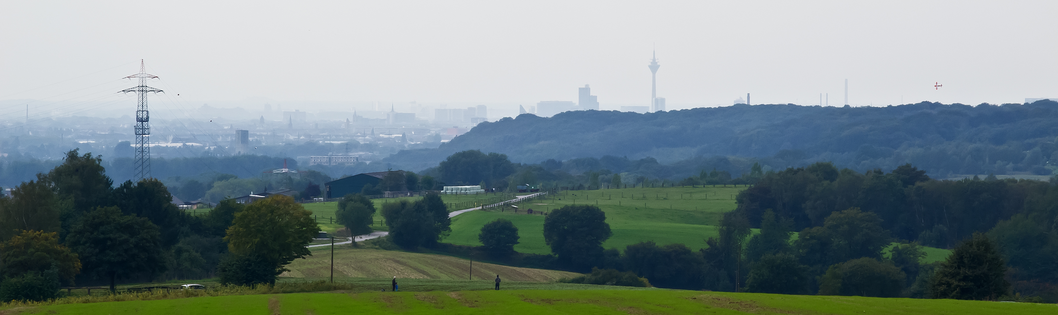 Gerresheimer Höhen, Übergang Niederrhein/Niederbergisches Land; Aufnahmestandort nordöstlich vom Reitstall Hanten (Heide, an der Straße „Gans“; vorne links) in Erkrath (Kreis Mettmann); links Winkelabspannmast der 110-kV-Freileitung Neanderthal Ost/West (Bl. 1036) mit Mobilfunkantennen an der A3